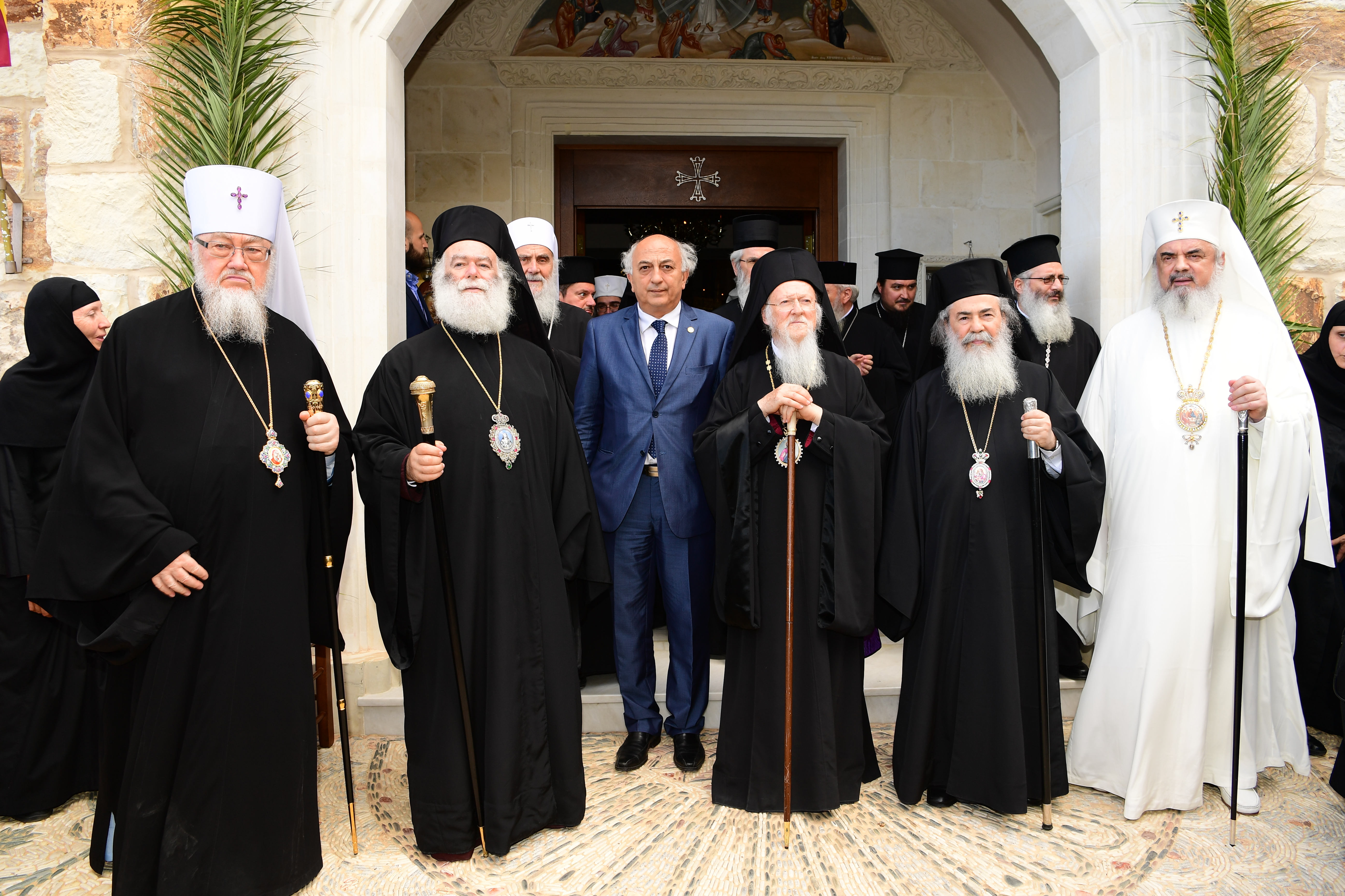 Δήλωση Υφυπουργού Εξωτερικών, Γιάννη Αμανατίδη για την ολοκλήρωση των εργασιών της Αγίας και Μεγάλης Συνόδου της Ορθοδόξου Εκκλησίας (Χανιά 26.06.16)